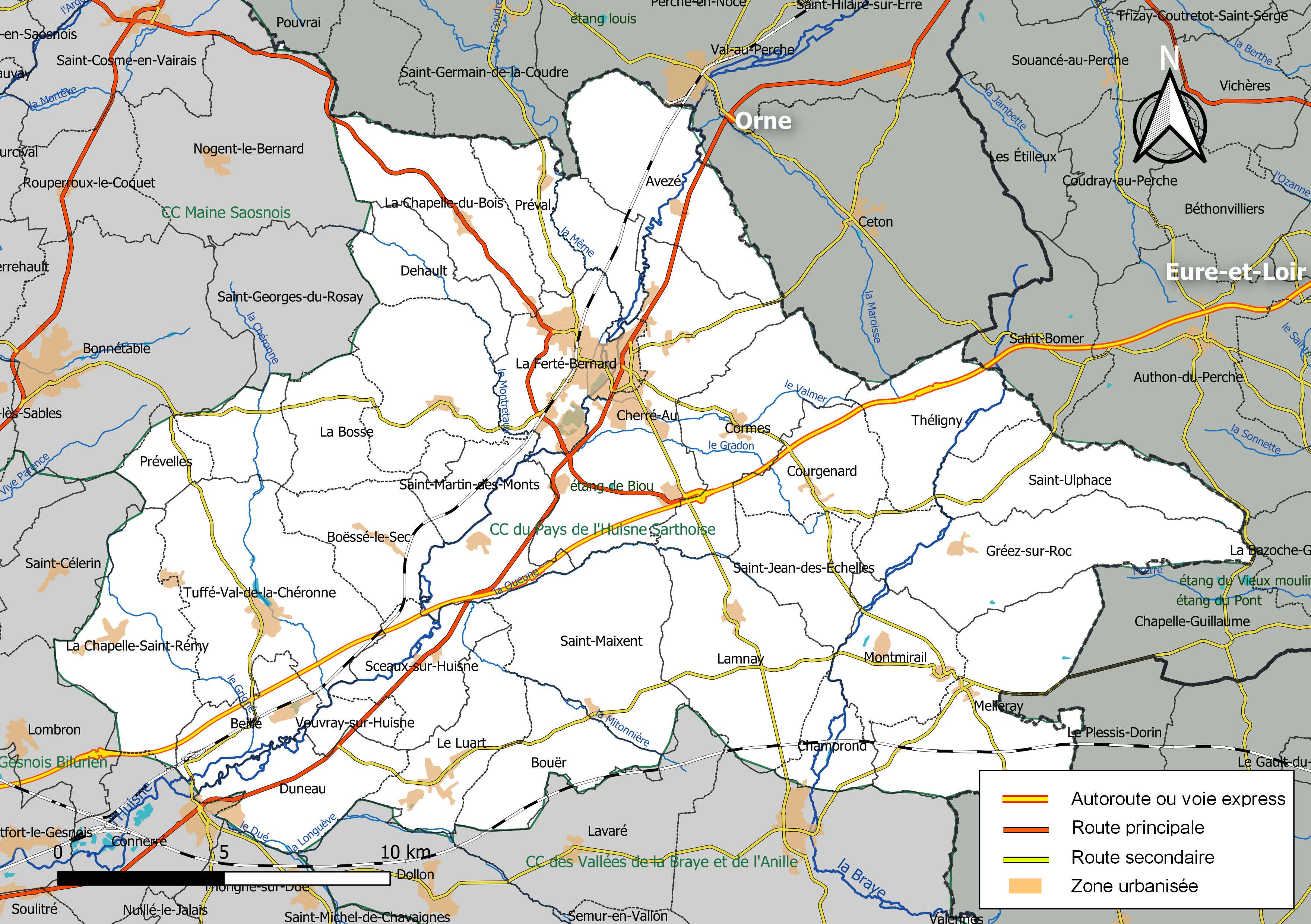 Carte géographique de la Communauté de communes du Pays de l'Huisne Sarthoise, département de la Sarthe, France. Composition au 1er janvier 2019.